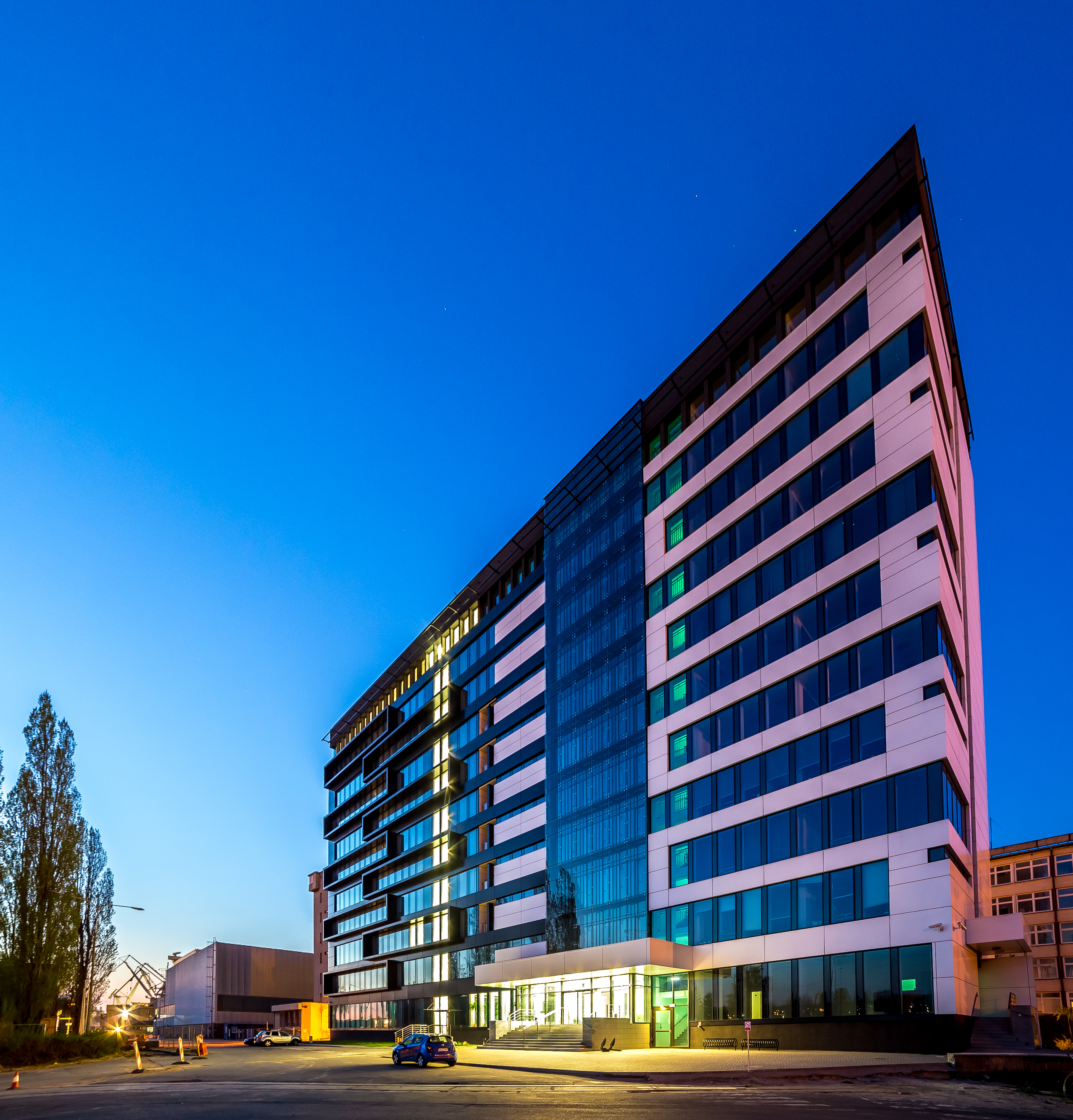 Gdynia, ul. Czechosłowacka 3 - Bałtycki Port Nowych Technologii